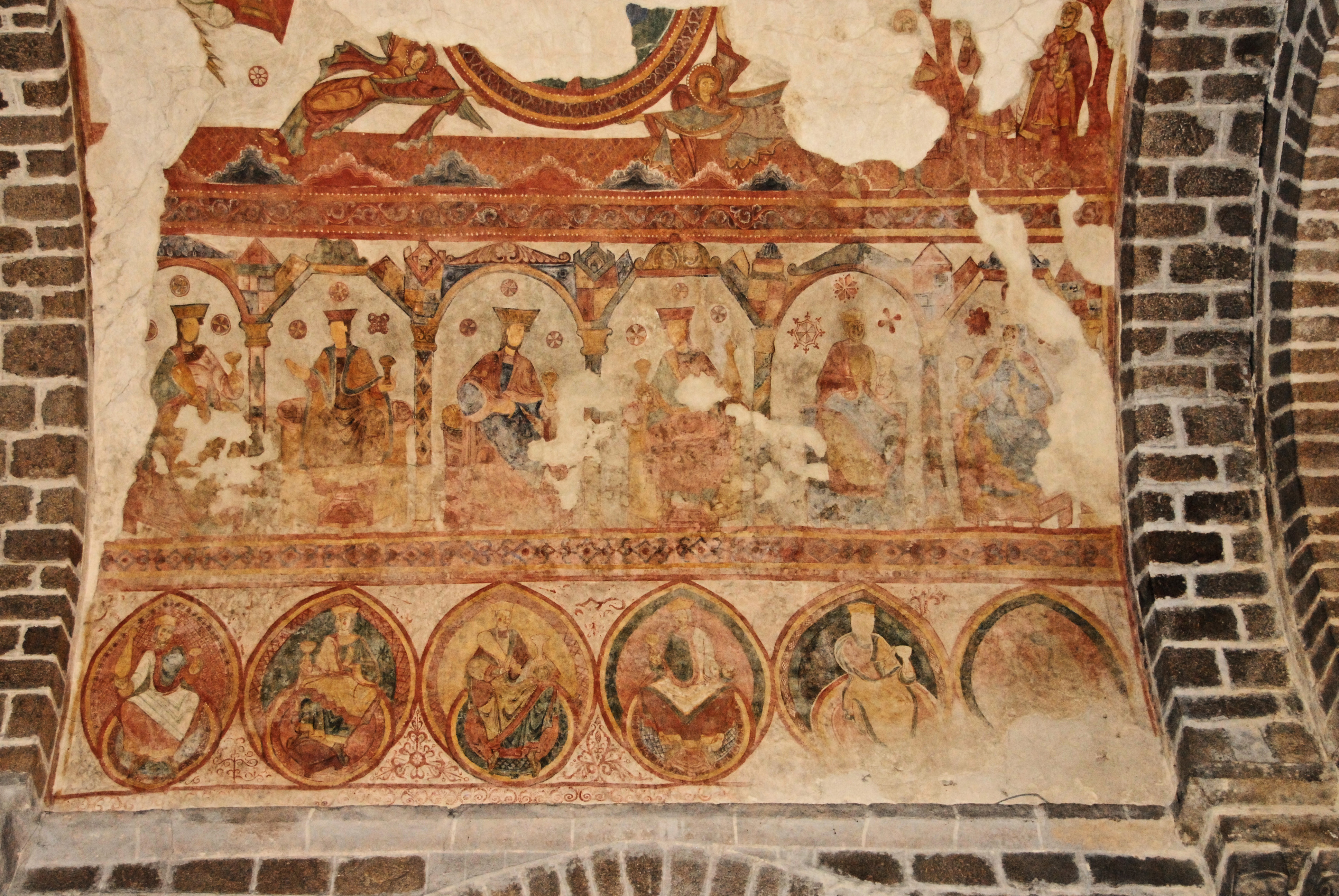 St-Junien, Fresko, Mittelscjiff, Joch 2